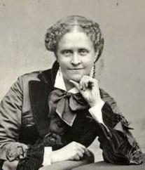 Helen Hunt Jackson